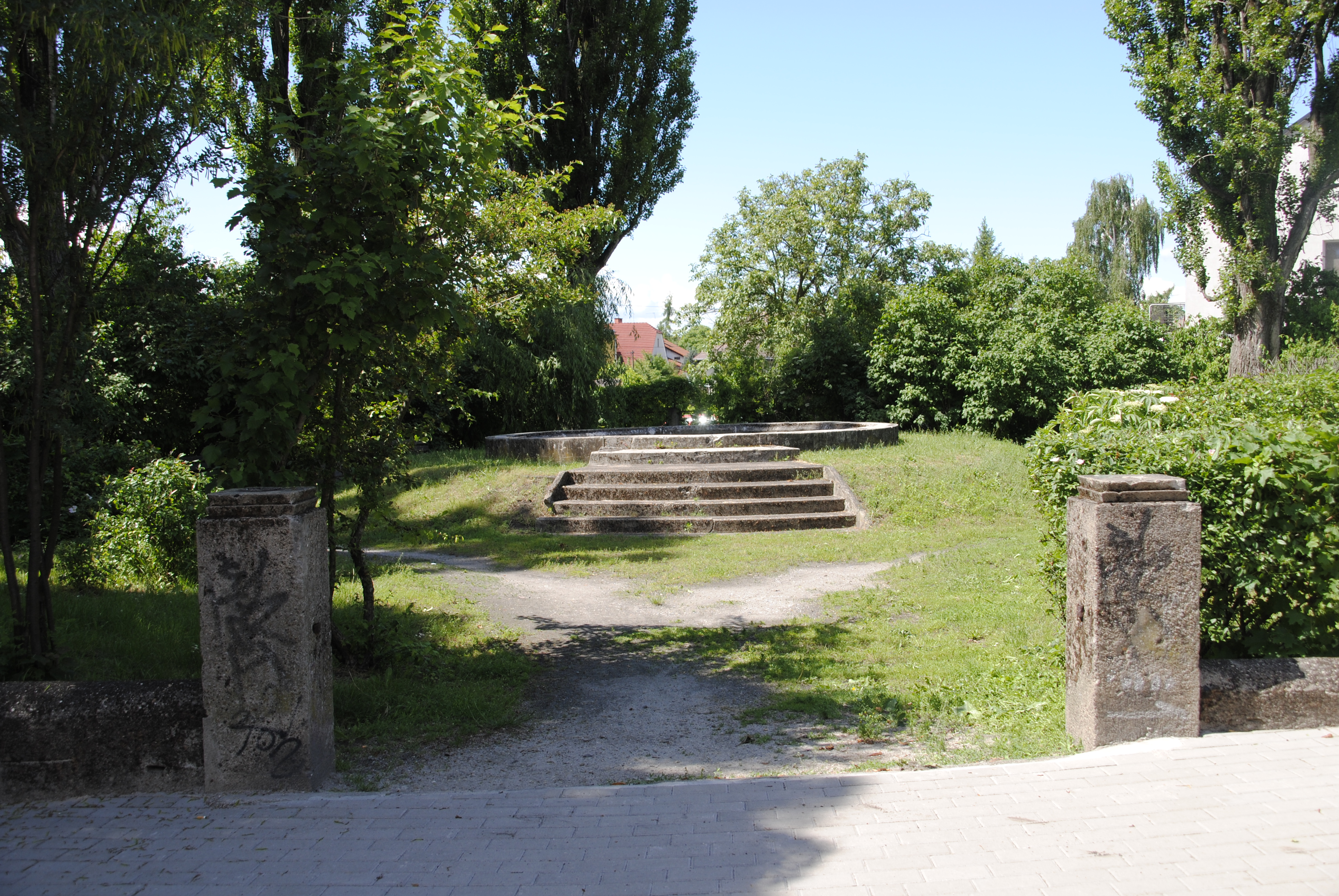 Denkmal für die Gefallenen des 1. Weltkriegs in Königlich Neudorf (Bolko)